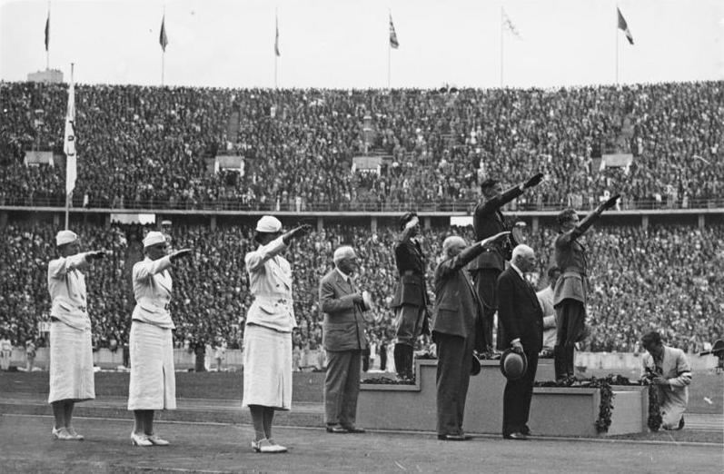 Berlin, Olympiade, Siegerehrung Fünfkampf Olympische Spiele 1936 Sieger-Ehrung im Fünfkampf auf der Sieger-Tribüne von rechts nach links: Oberleutnant Abba-Italien (II.) Hauptmann Handrick-Deutschland (I.) Leutnant Leonard-USA (III.) Fot. Stempka Abgebildete Personen: Abba, S.: Fünfkampfsportler, Olympiateilnehmer 1936, Italien